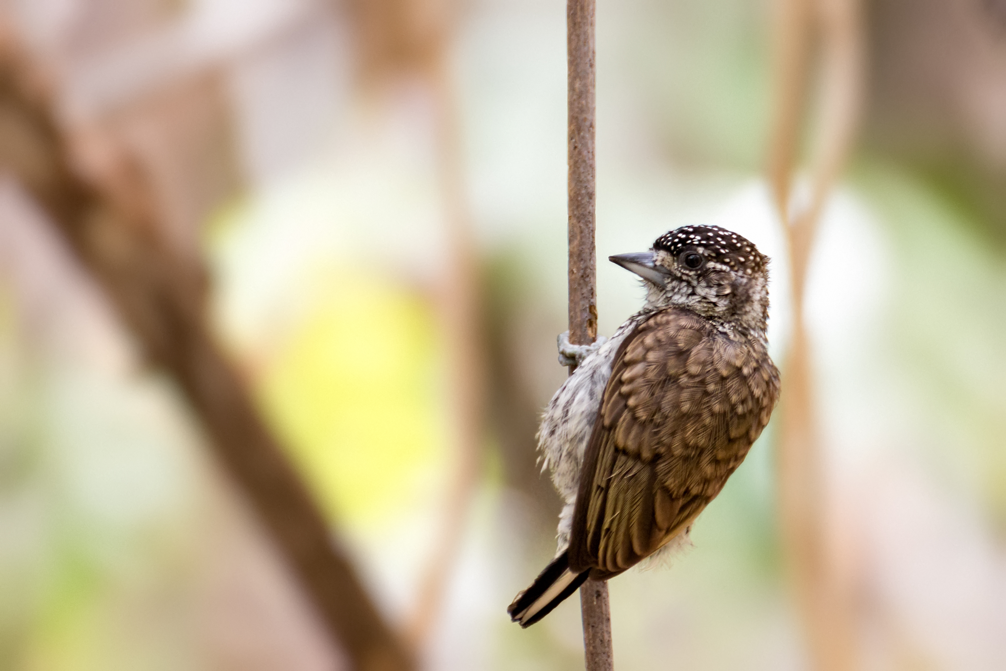 Scaled Piculet | Telegrafista Escamado (Picumnus squamulatus rohli) (♀)